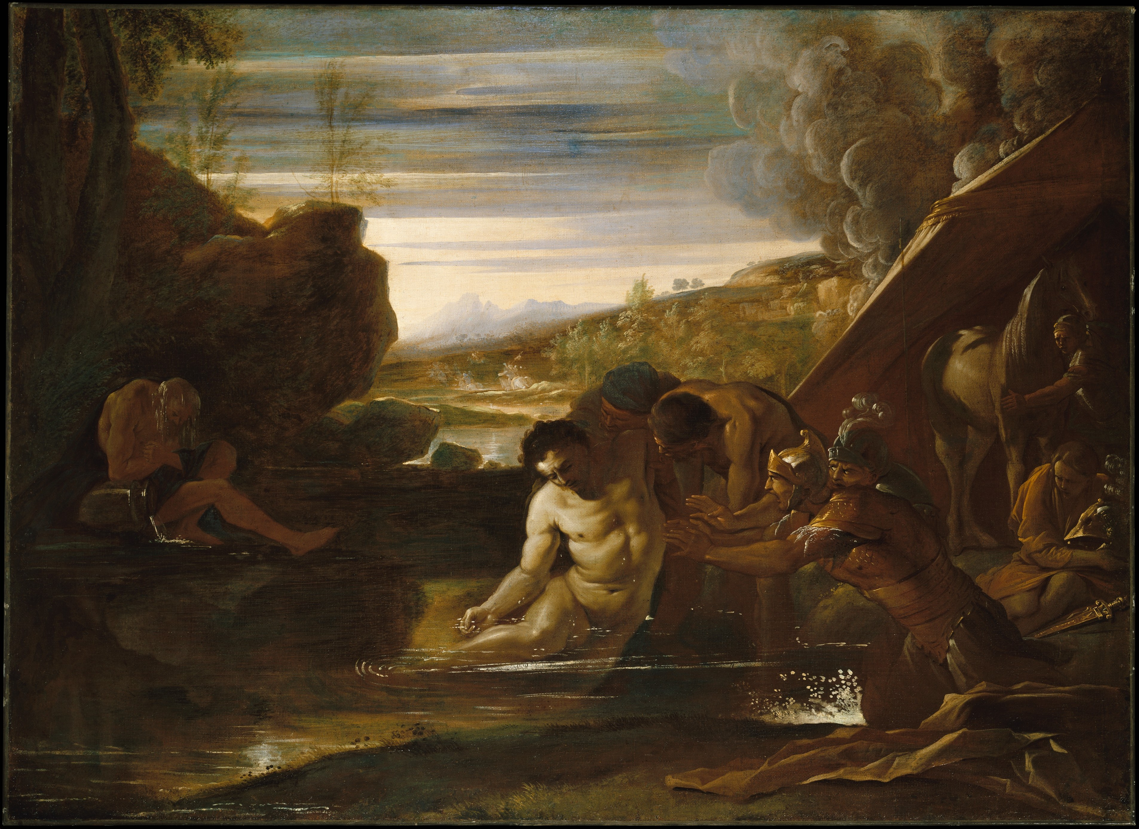 Pietro Testa - Alessandro Magno salvato dai suoi soldati nel fiume Cidno 1650 circa olio su tela 96.5 x 137.2 cm Metropolitan Museum of Art - New York